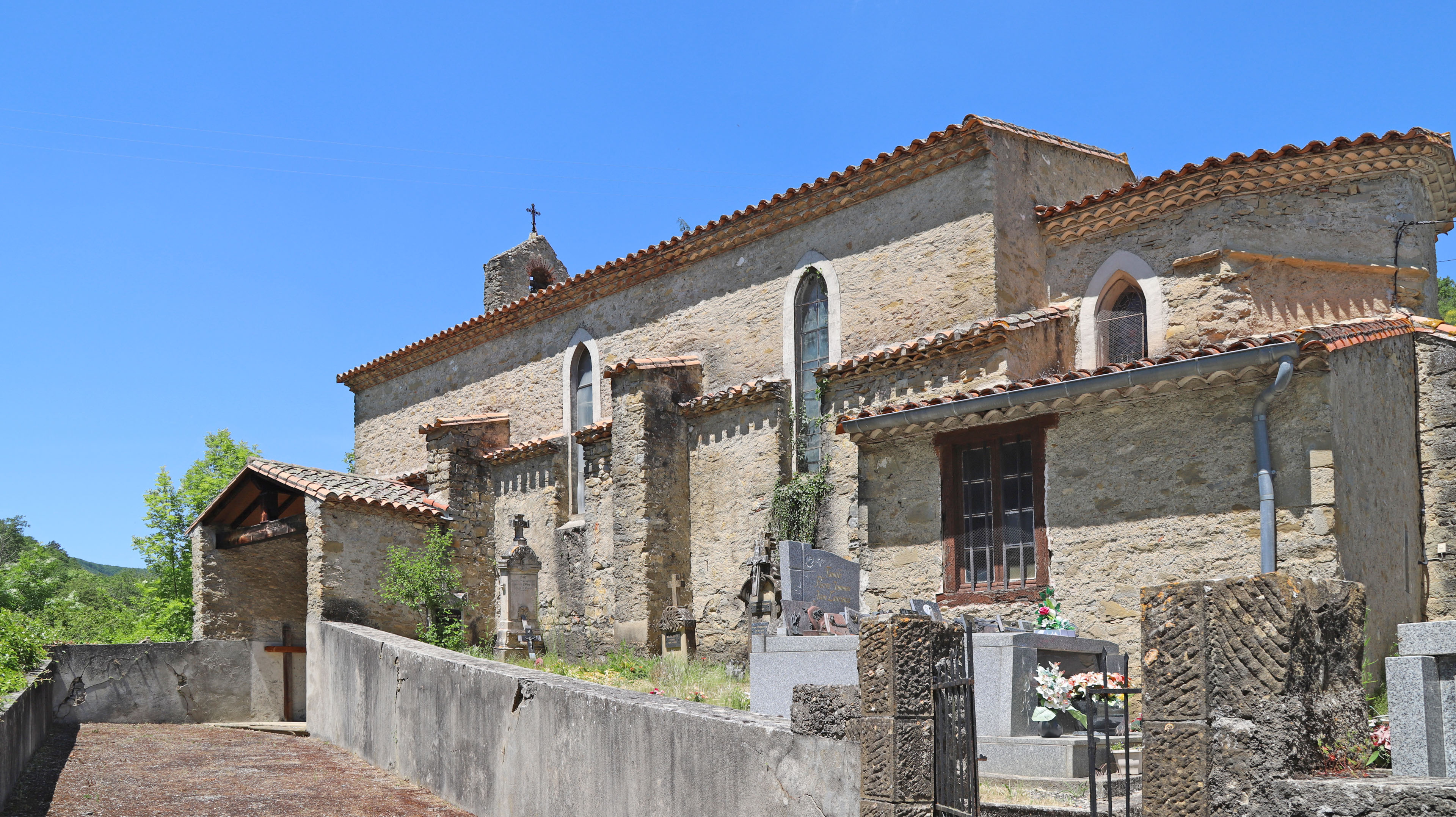 Eglise de St André